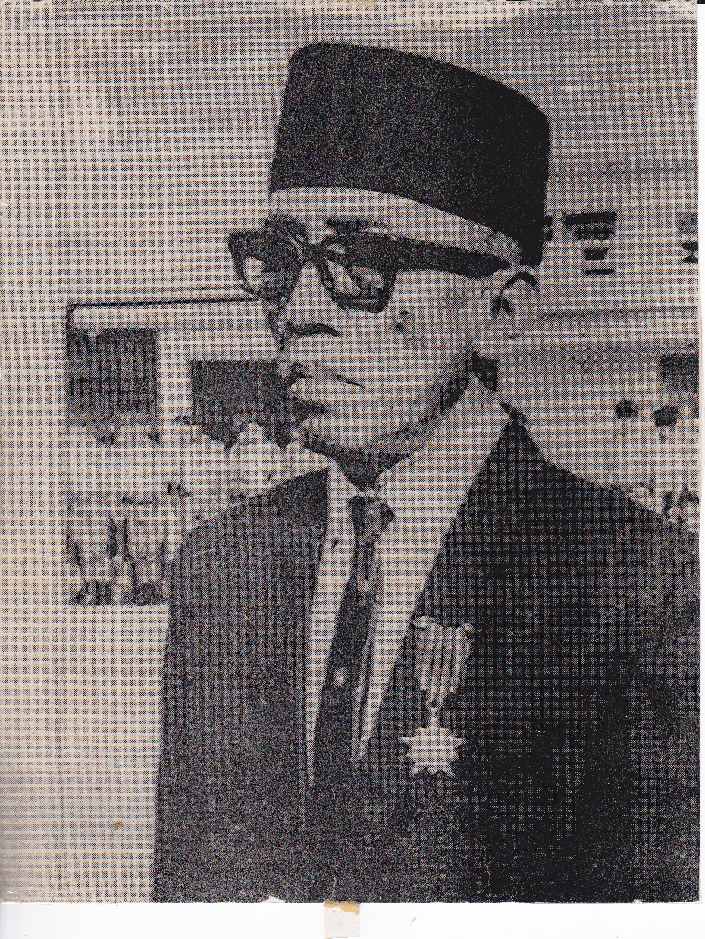 Andi Pangerang Petta Rani